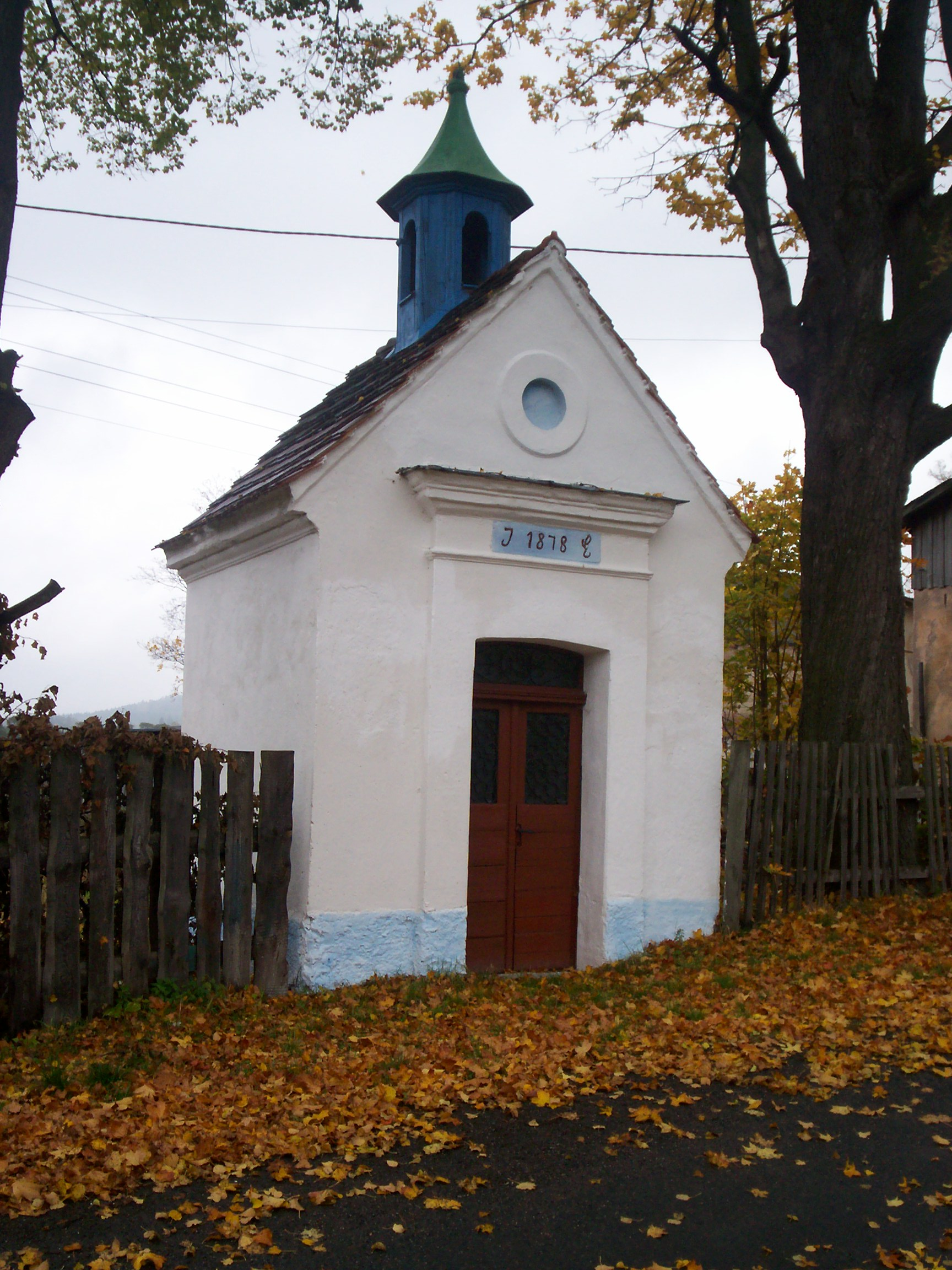 Polska. Powiat Kamienna Góra, wieś Błażkowa, przydrożna kapliczka.